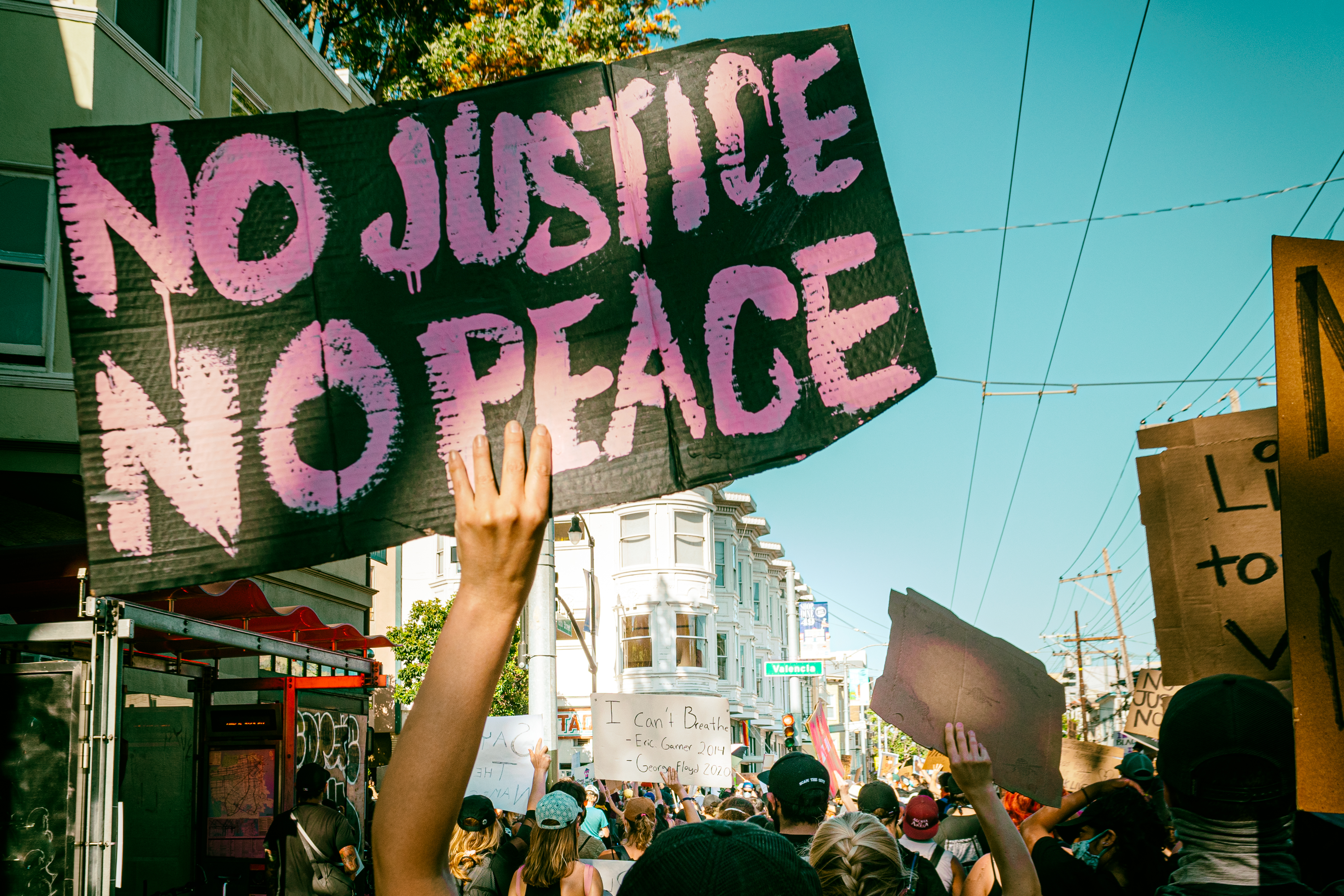 blacklivesmatter